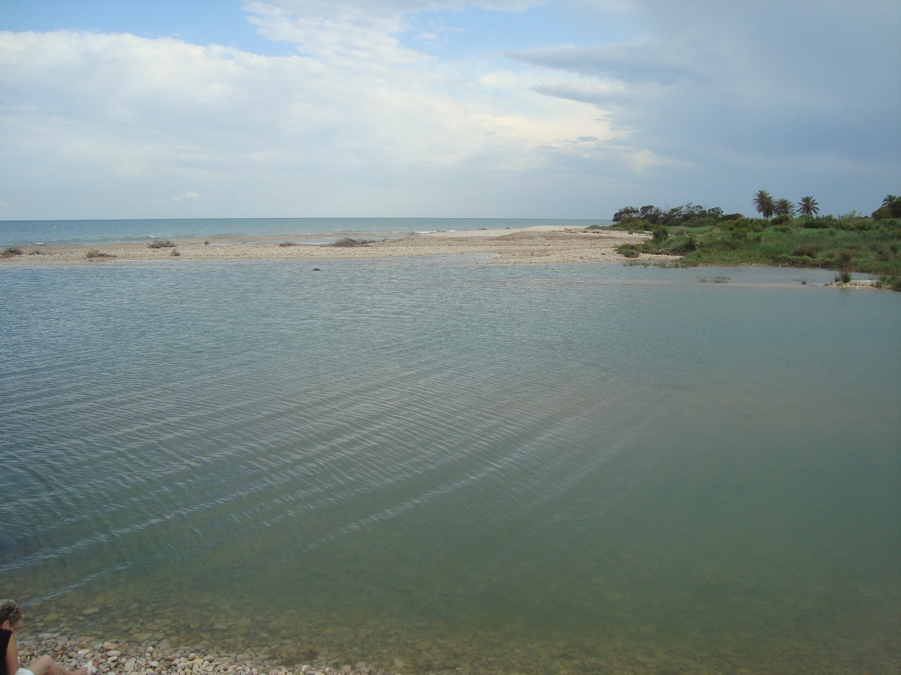 Zona humida de la desembocadura del riu de les Coves (Alcalà de Xivert) This is a a photo of a wetland in the Land of Valencia, Spain, with id: CZHCV-16